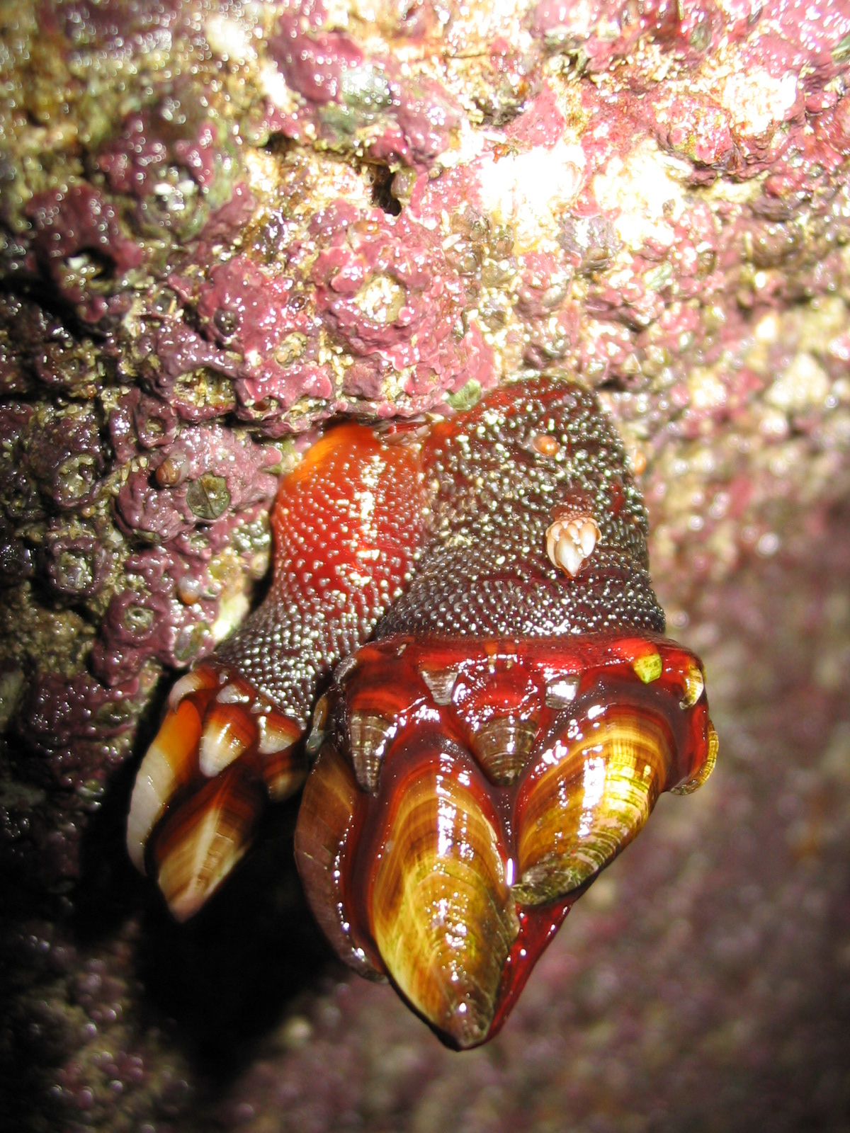 Pollicipes pollicipes